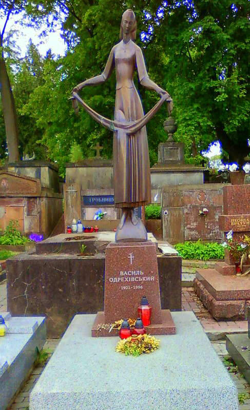 Памятник на могиле Одреховского Василия Павловича (Лычаковское кладбище)